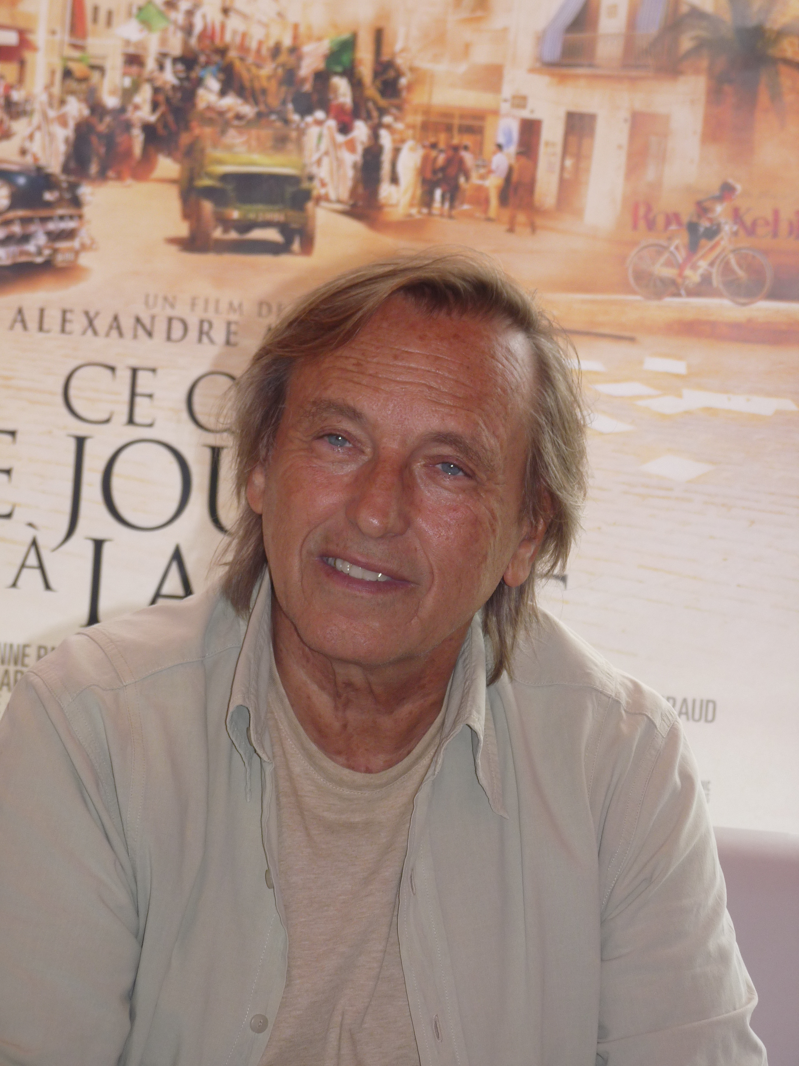 Alexandre Arcady